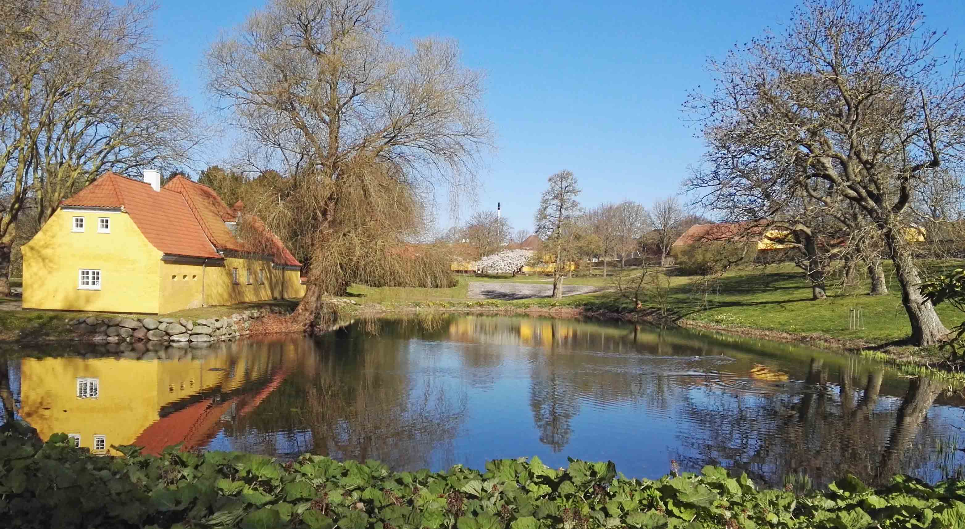 For enden af voldgraven ses Gudrun Schous Friluftsscene på Palsgård